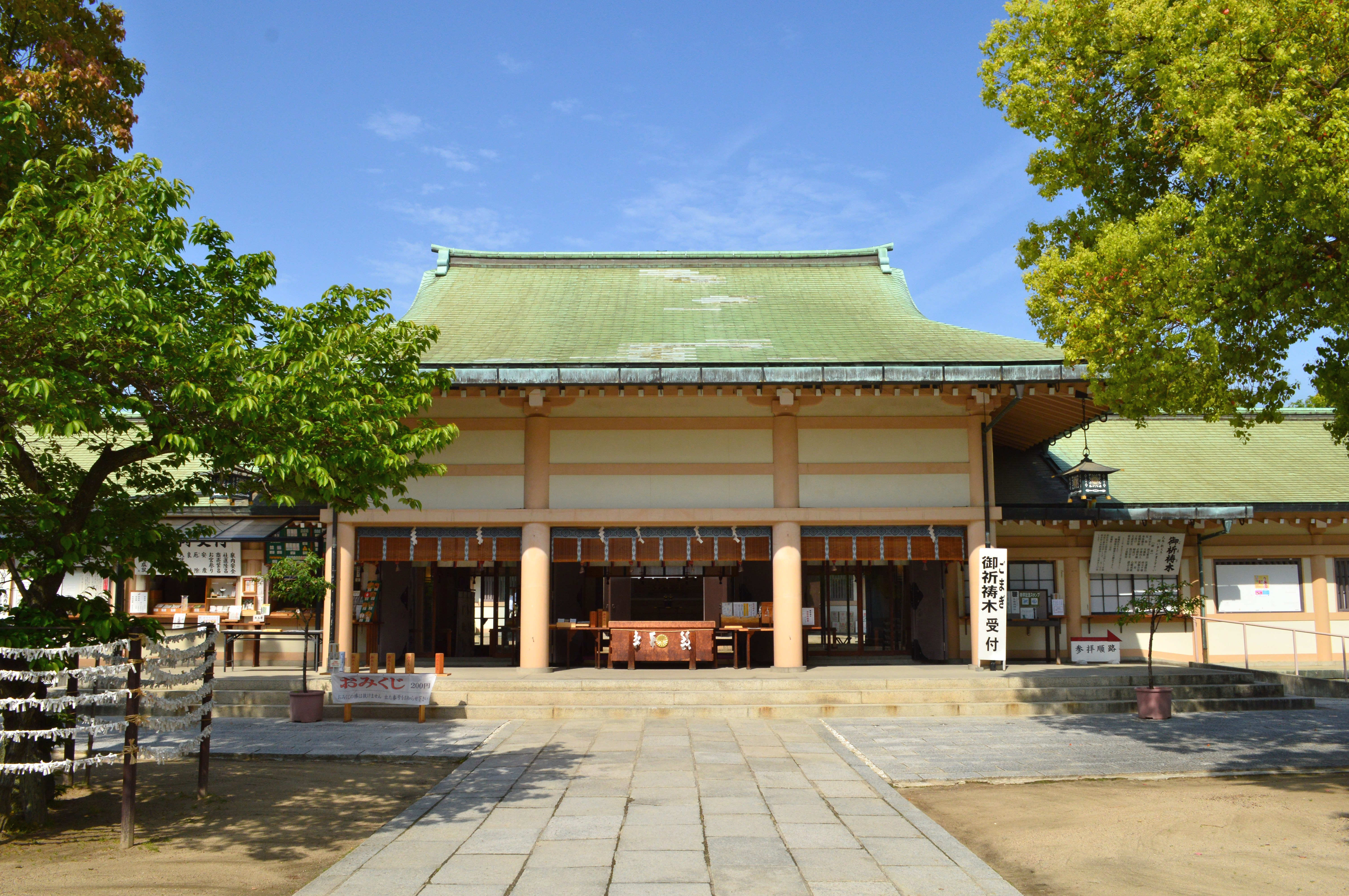 生國魂神社 拝殿